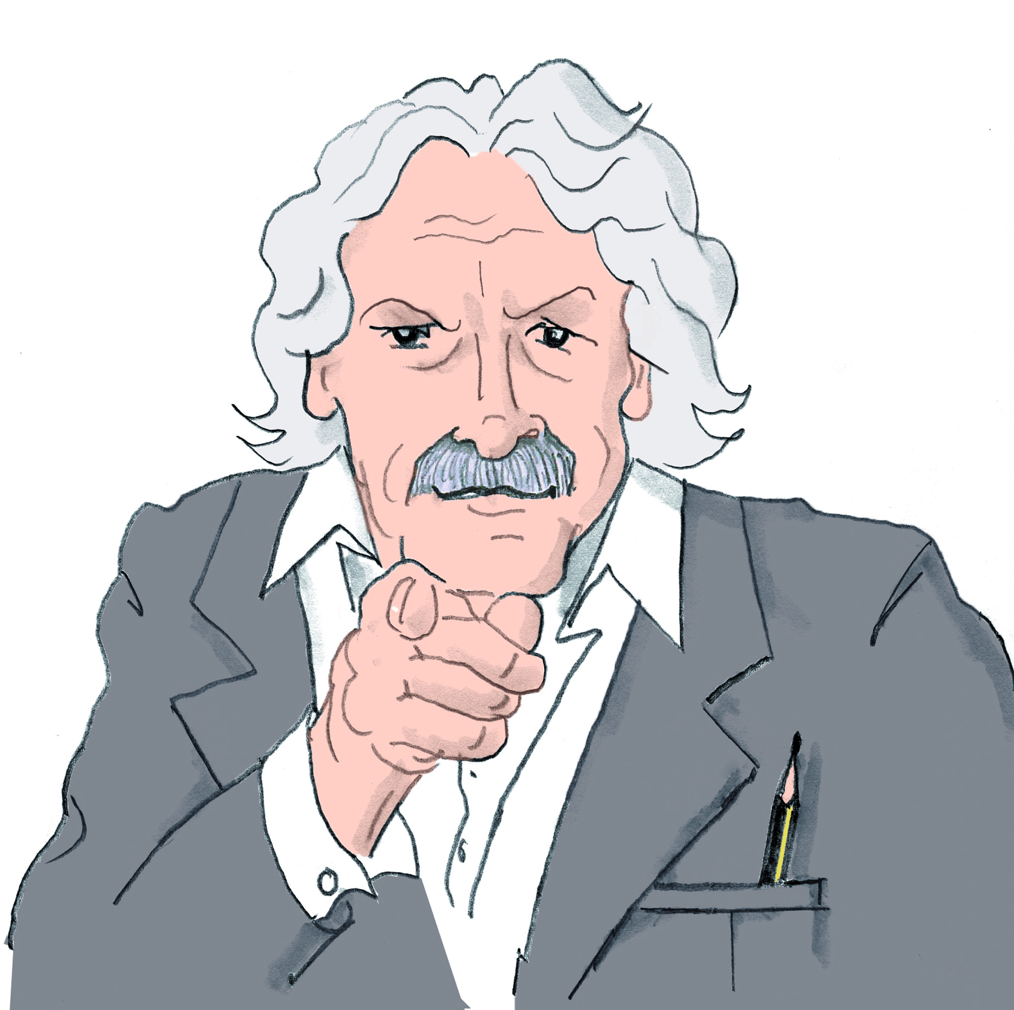 autorretrat